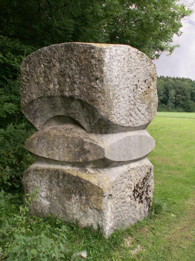 Skulpturenfeld Oggelshausen Bildhauersymposium 1969/70 Zdeněk Šimek, Kalksteim